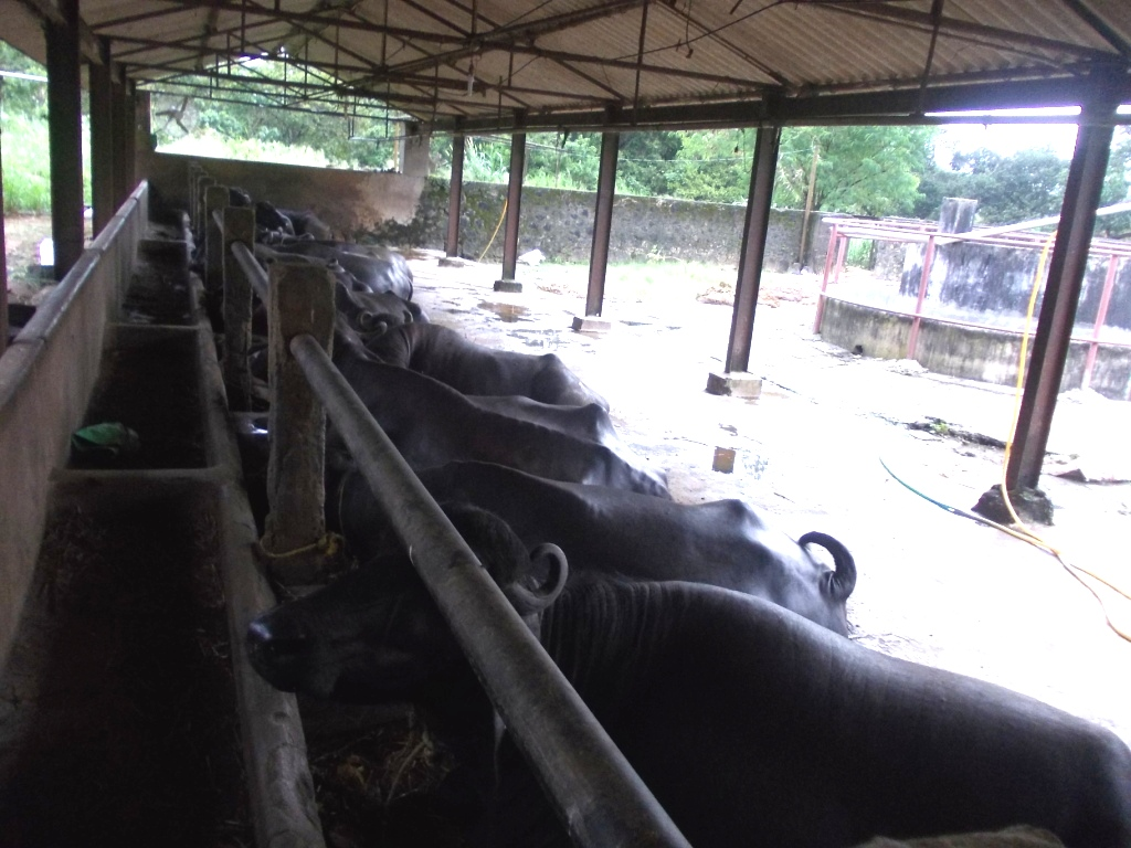 കന്നുകാലി ഫാം